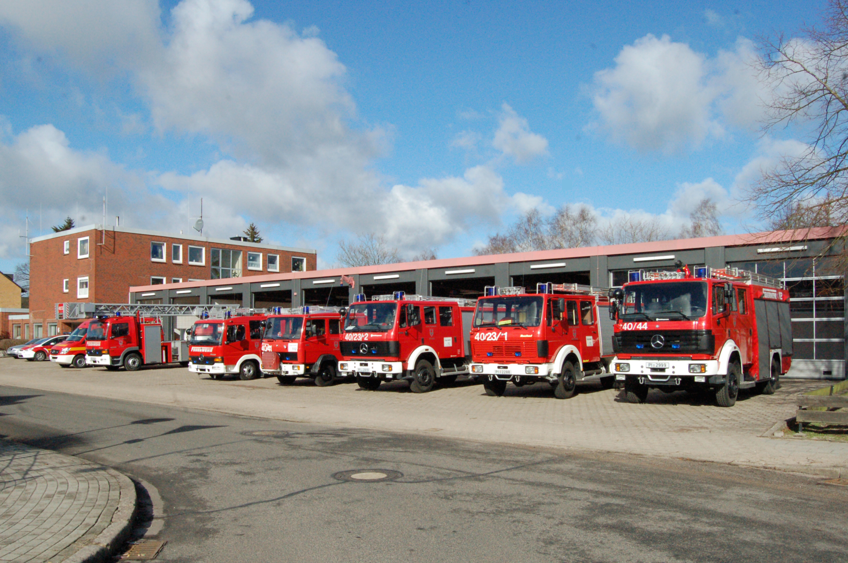 Die Feuerwehrwache in Uetersen, Schleswig-Holstein, mit einigen ihrer Feuerwehrfahrzeugen